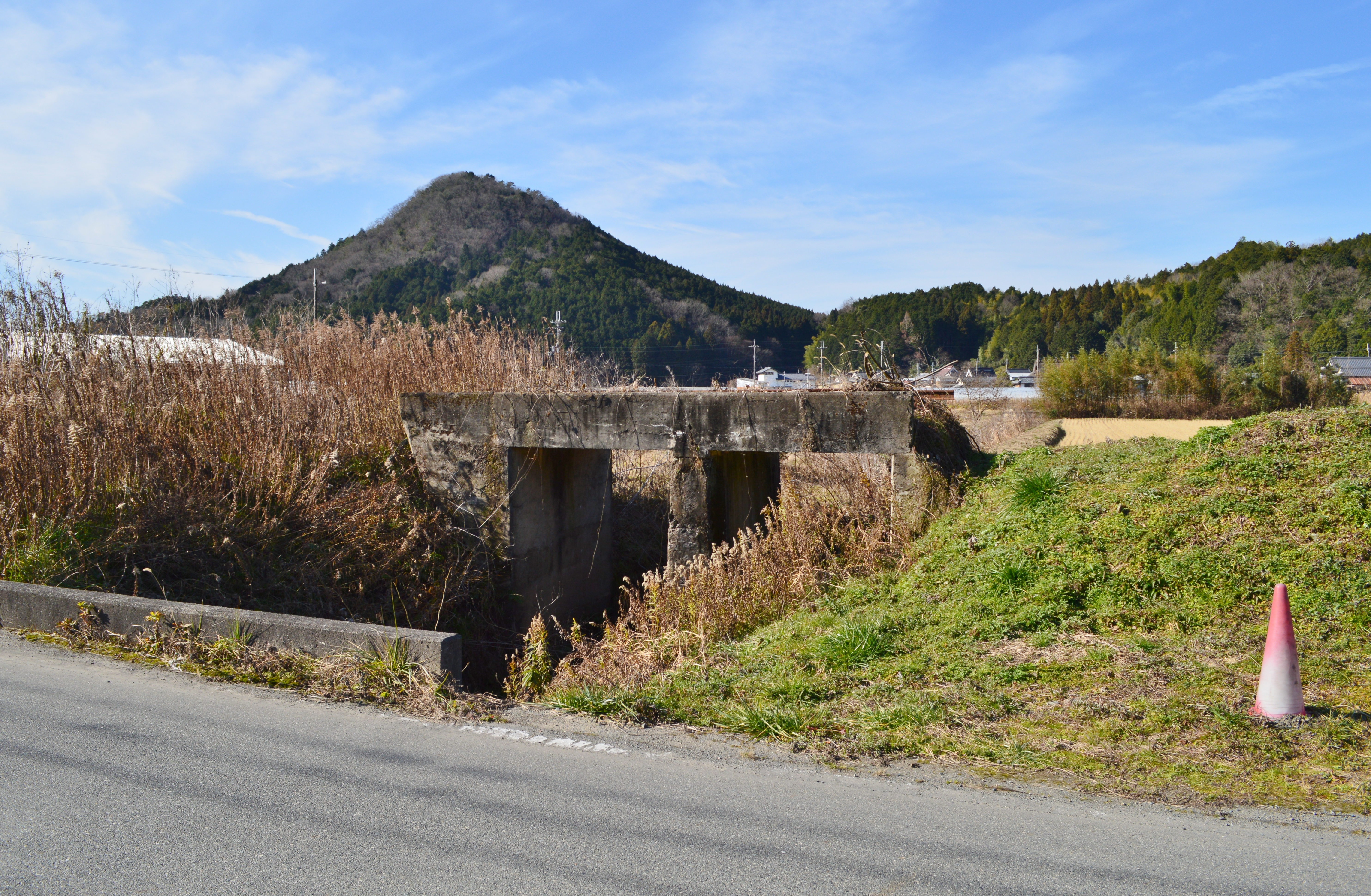 篠山線 橋梁跡